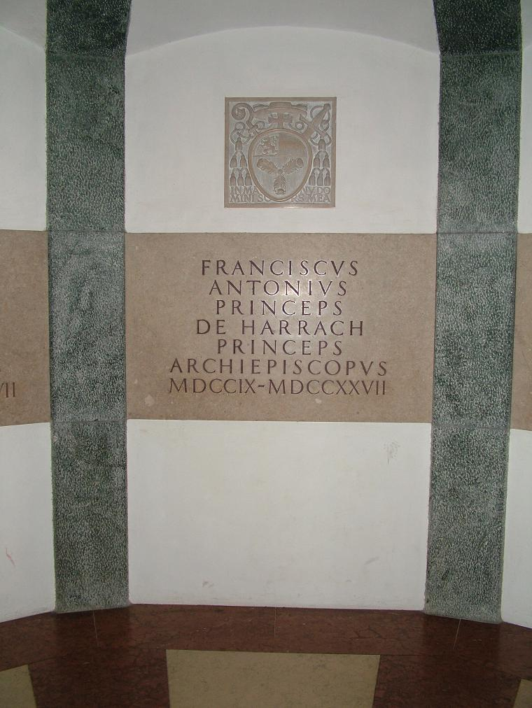 Grab Erzbischof Harrach in Salzburg